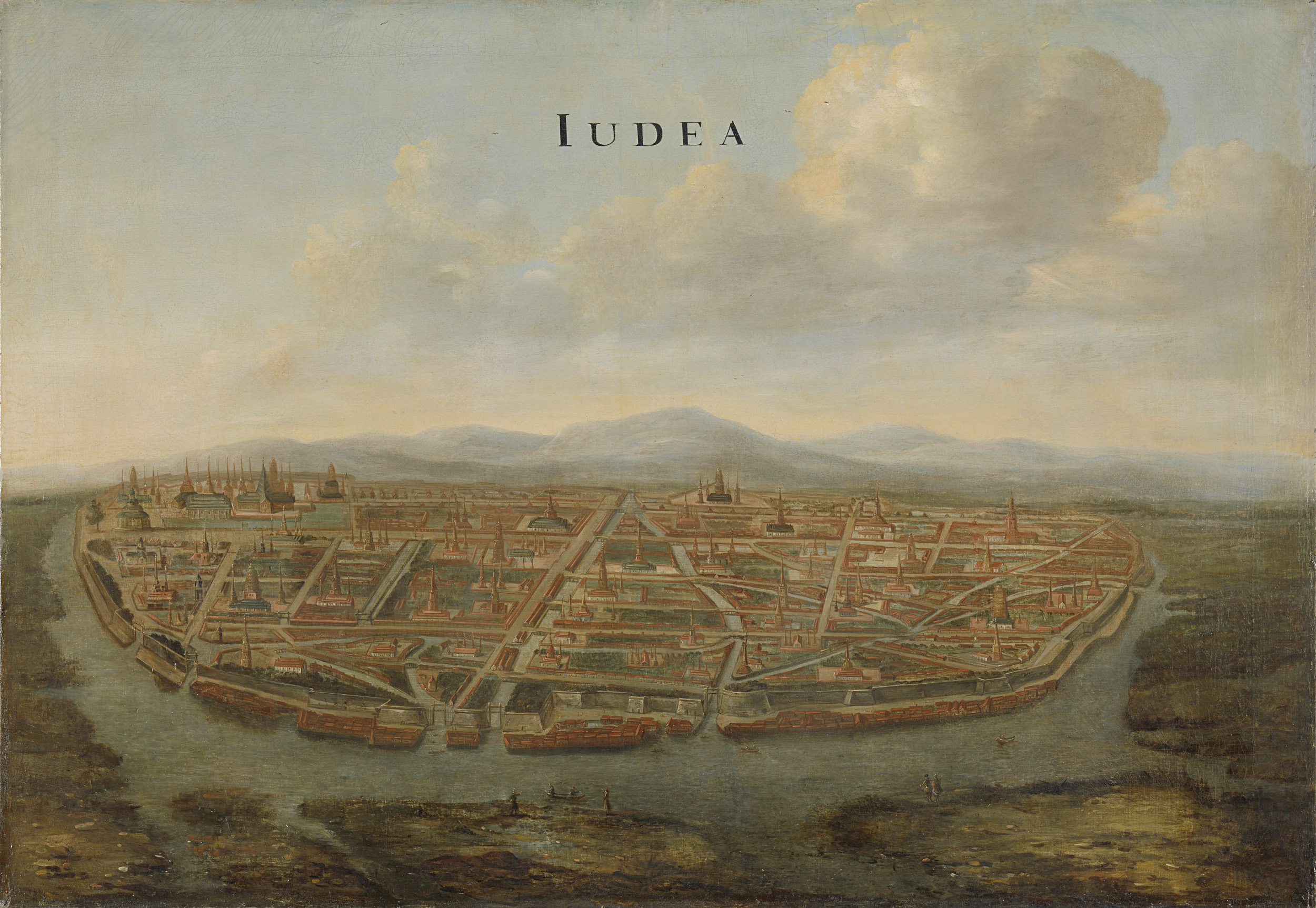 Gezicht op Judea (Ayutthaya), de oude hoofdstad van Siam (Thailand). Ommuurde complex met tempels en ruïnes, gezien in vogelvlucht.; Toegeschreven aan Johannes Vinckboons (1617–1670), olieverf op doek, ca. 1662–1663